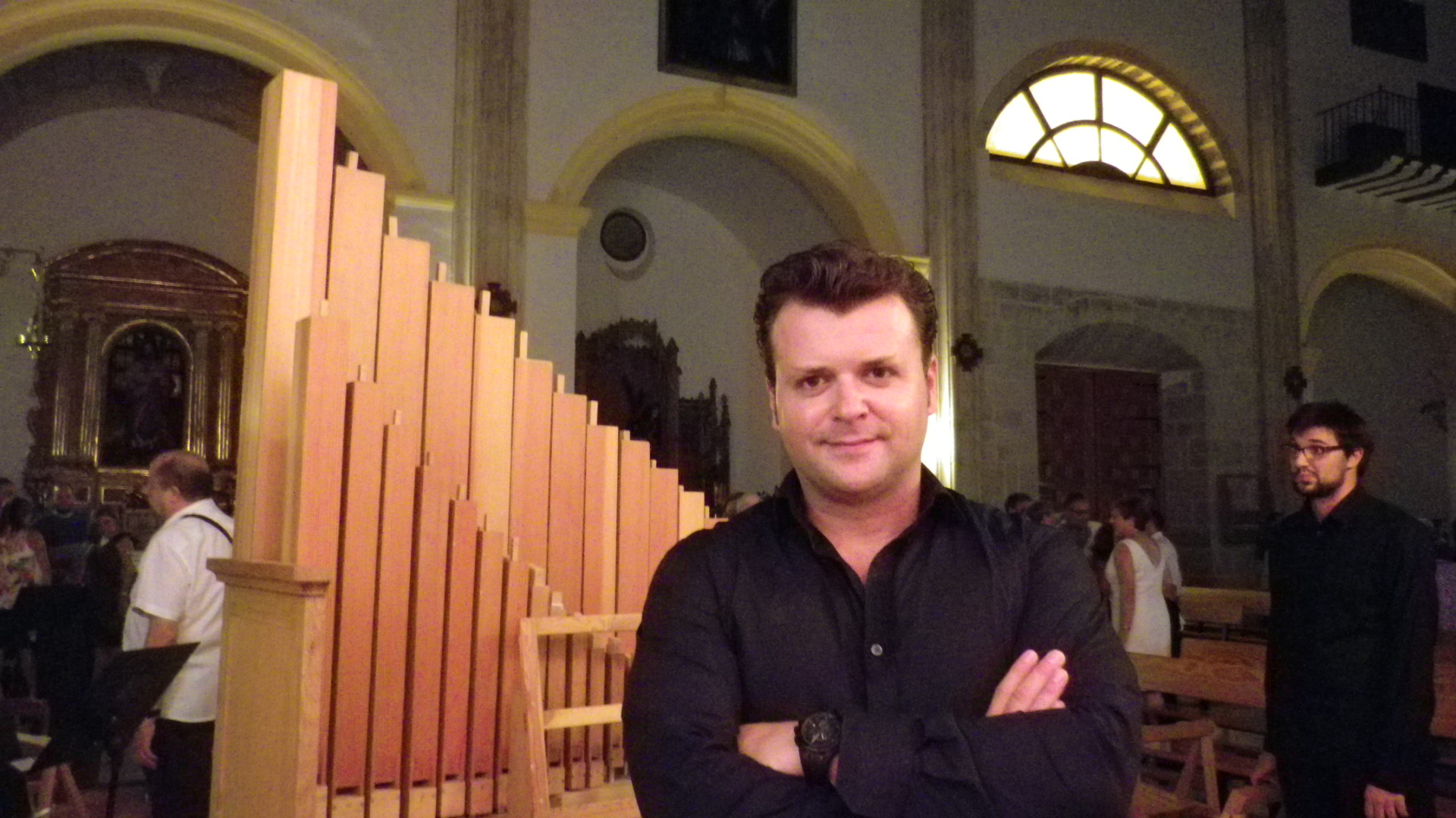 Fotografía de Joaquín Torrecillas Román, músico almeriense, director de la Coral Virgen del Mar de Almería.